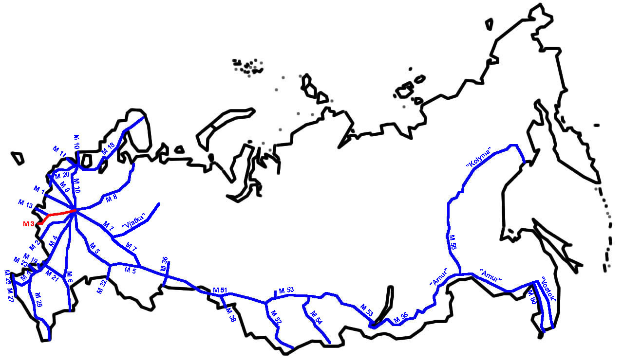 M3 im russischen Fernstraßennetz